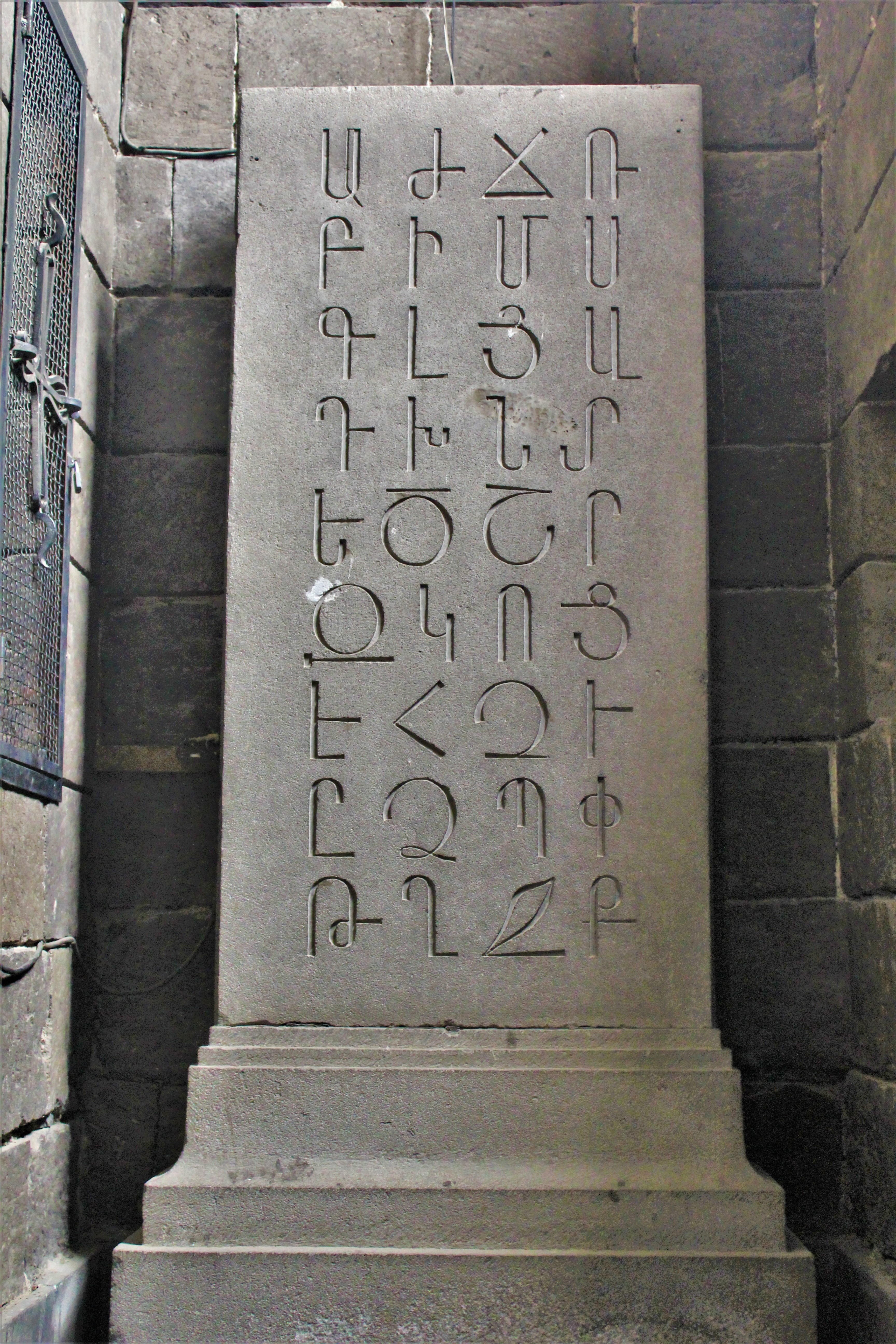 Օշական Մեսրոպ Մաշտոց եկեղեցուց հատված 113/22